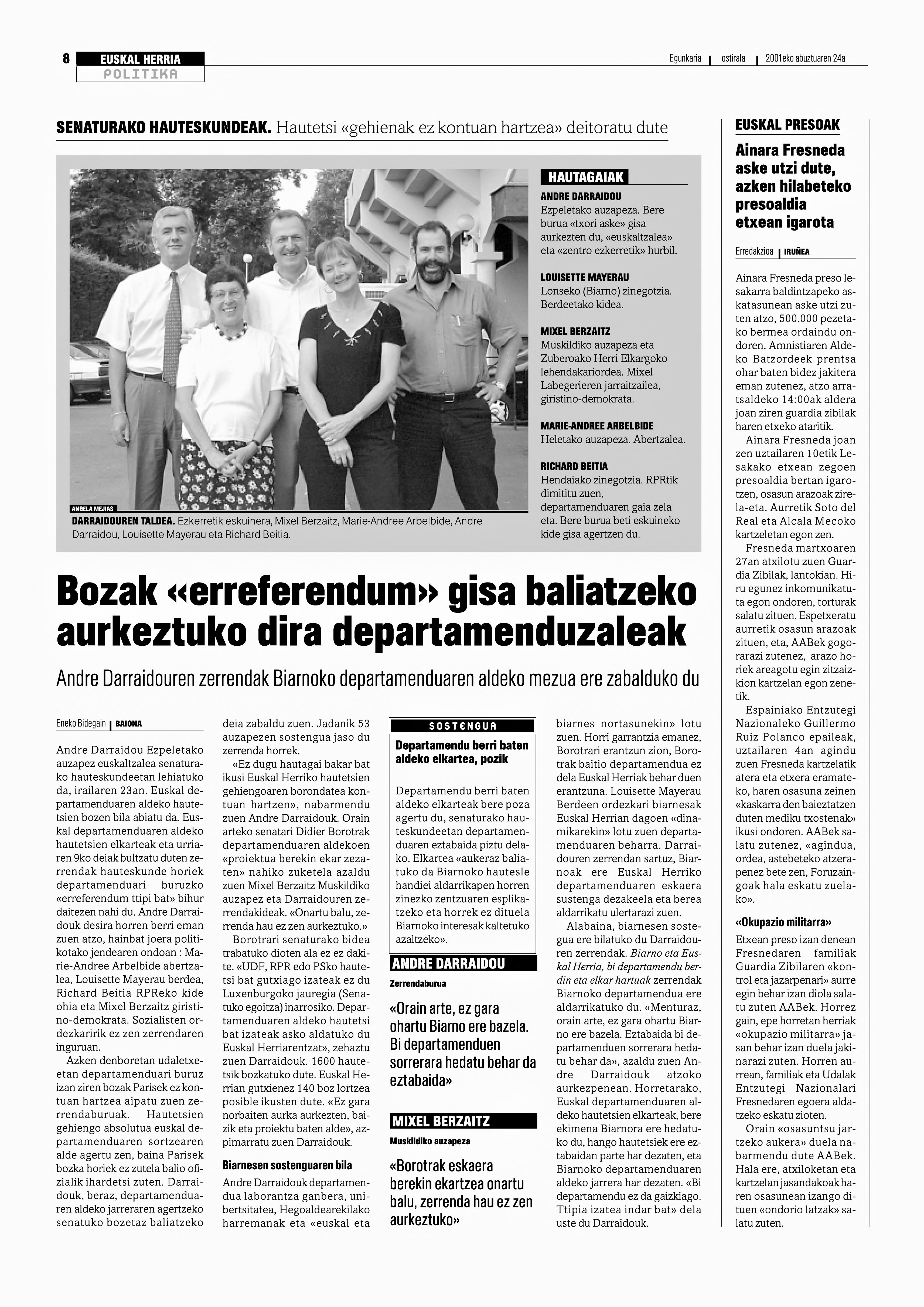 Albistea Euskaldunon Egunkaria.Mixel Berzaitz, Marie-Andree Arbelbide, Andre Darraidou, Louisette Mayerau eta Richard Beitia.